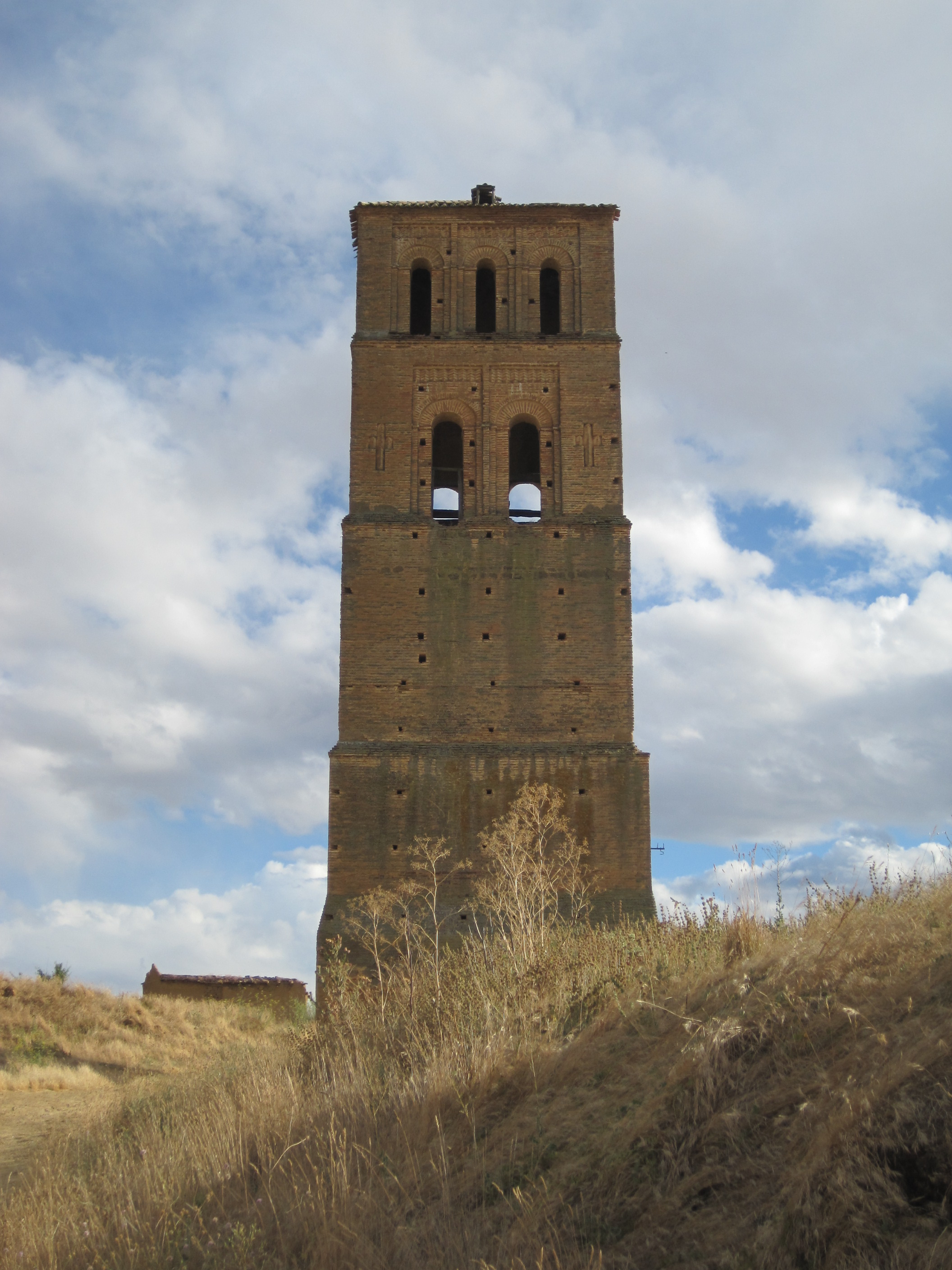 Despoblado de Villacreces (Valladolid, España).